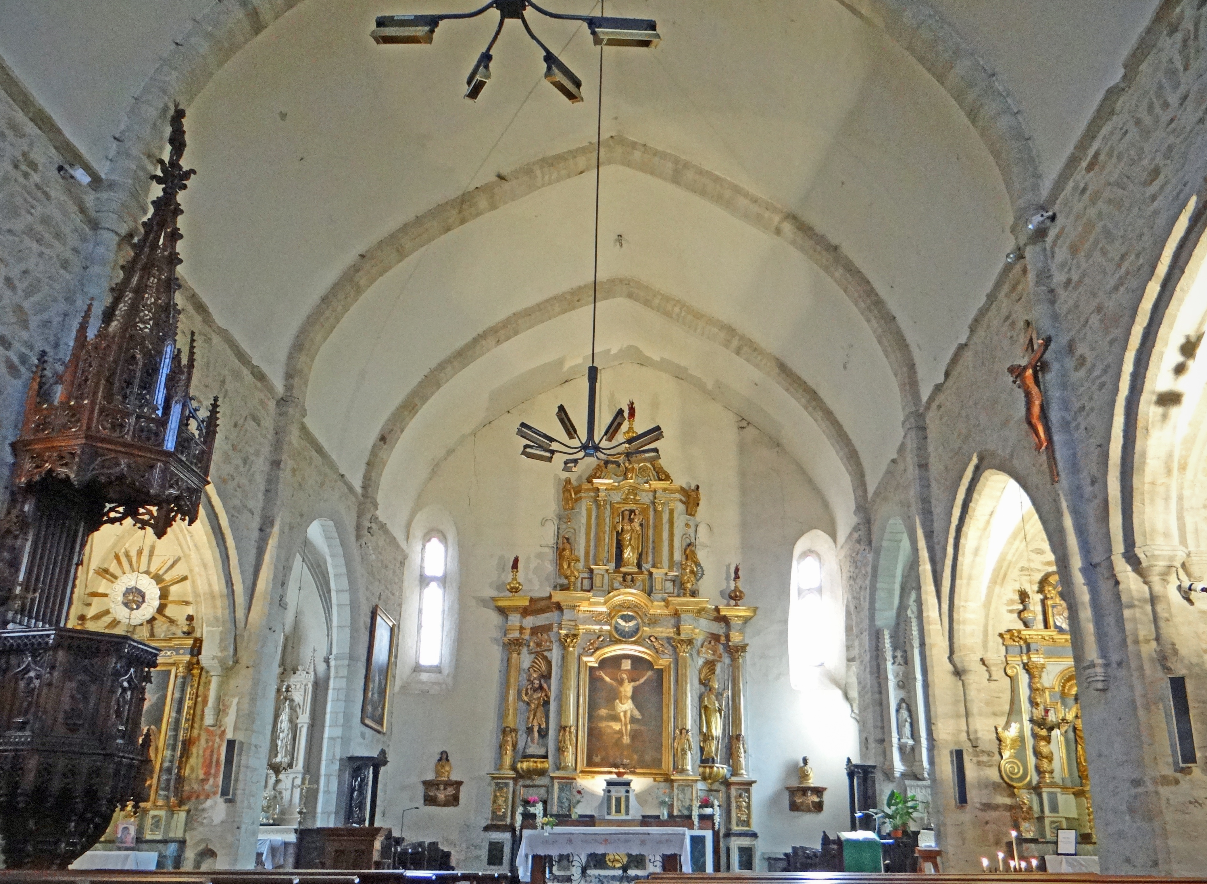 Sauveterre-de-Rouergue - Église Saint-Christophe - Nef